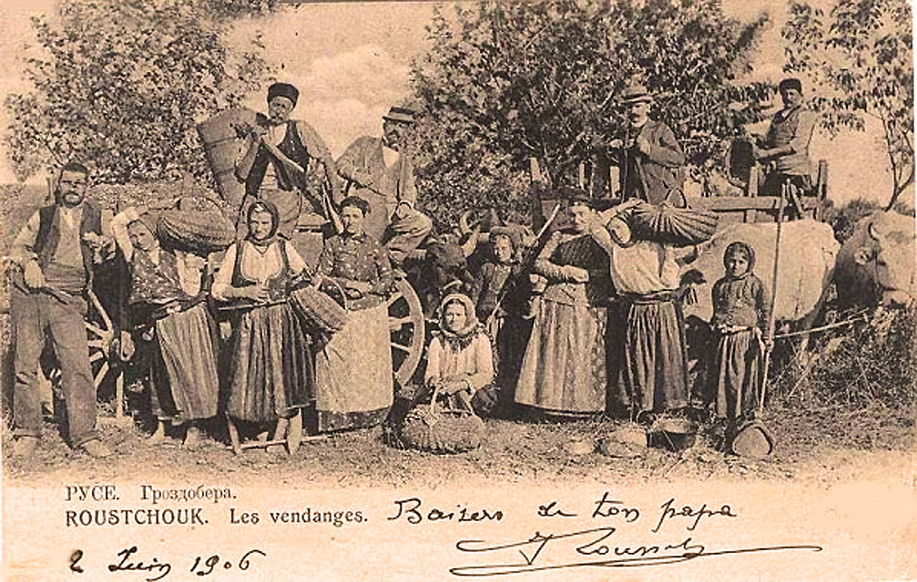 Vendanges à Roustchouk